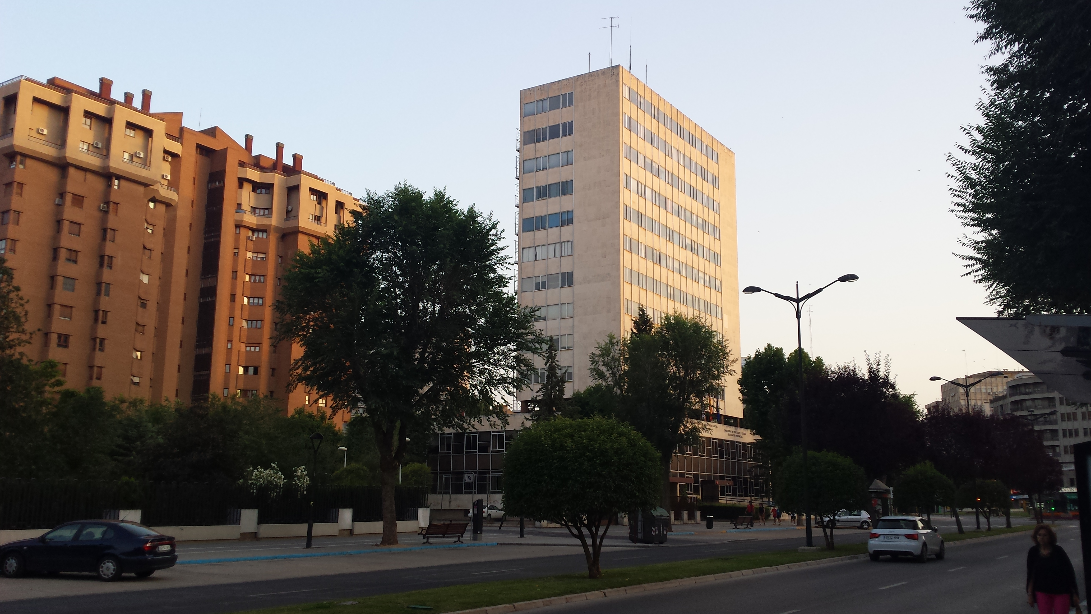 Servicios Periféricos de la Consejería de Educación, Cultura y Deportes de la Junta de Comunidades de Castilla-La Mancha en Albacete. Avenida de la Estación. Albacete